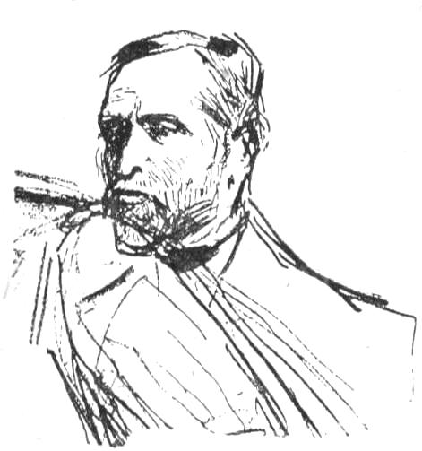 "M[aîtr]e Leblois." (Deuxième audience du procès)